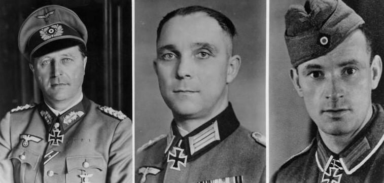 Hohe Auszeichnungen, Breith, Bäke, Karl Hohe Auszeichnungen Der Führer verlieh das Eichenlaub mit Schwertern zum Ritterkreuz des Eisernen Kreuzes an General der Panzertruppen Hermann Breith (links), Kommandierender General eines Panzerkorps, als 48. und Oberstleutnant d.R. Franz Bäke (Mitte), Kommandeur eines Panzerregiments, als 49. Soldaten der deutschen Wehrmacht.- Mit dem Eichenlaub zum Ritterkreuz des Eisernen Kreuzes wurde Unteroffizier Josef [ auch: Joseph] Karl (rechts), Geschützführer in einer Panzerjäger-Abteilung, als 597. Soldat der deutschen Wehrmacht ausgezeichnet. Scherl Bilderdienst (OKW) 24.2.44 Abgebildete Personen: Breith, Hermann: General der Panzertruppe, Ritterkreuz (RK), Heer, Deutschland Bäke, Franz: Generalmajor, Ritterkreuz (RK), Heer, Deutschland Karl, Joseph: Unteroffizier, Ritterkreuz (RK), Heer, Deutschland